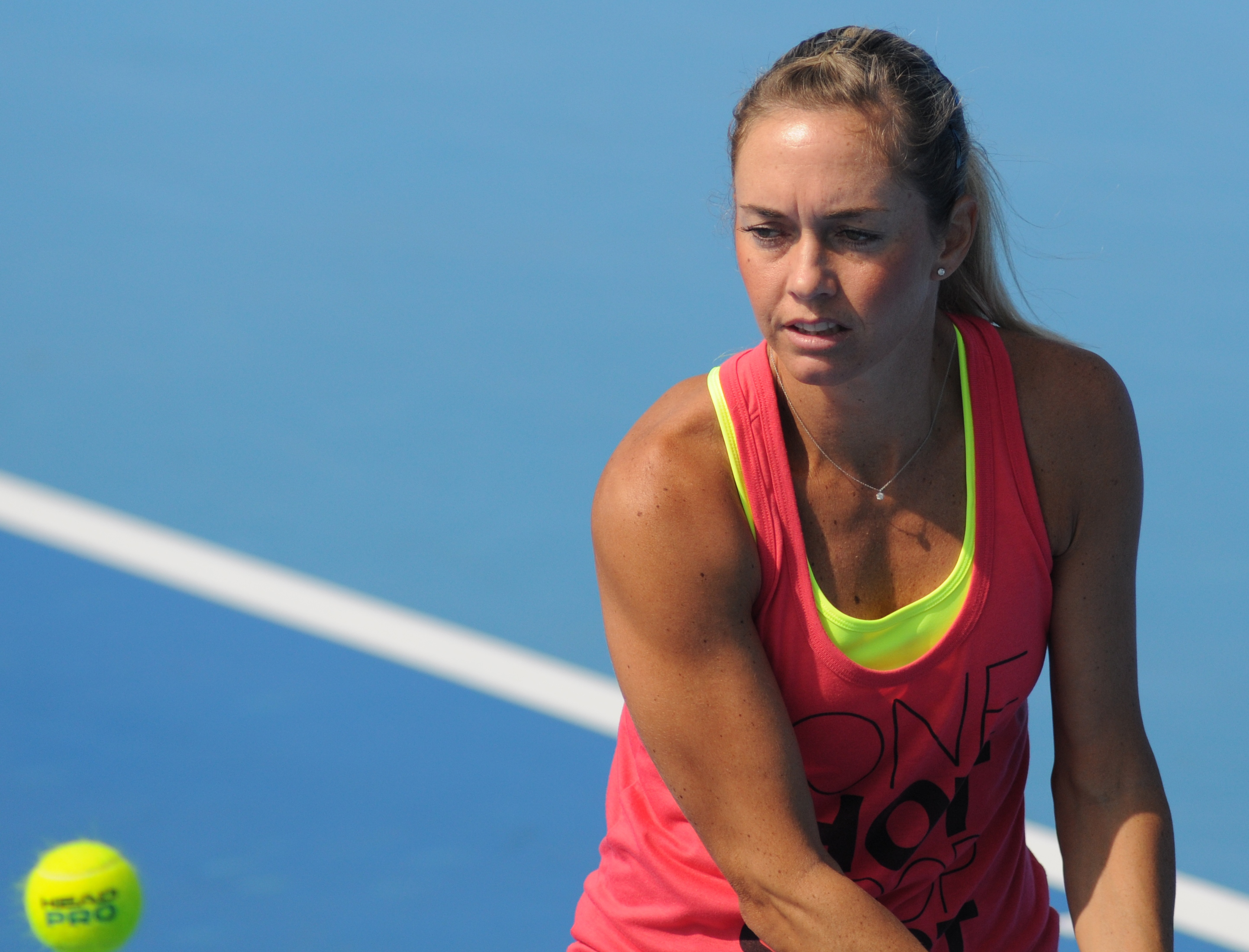 Klára Koukalová at the 2014 China Open